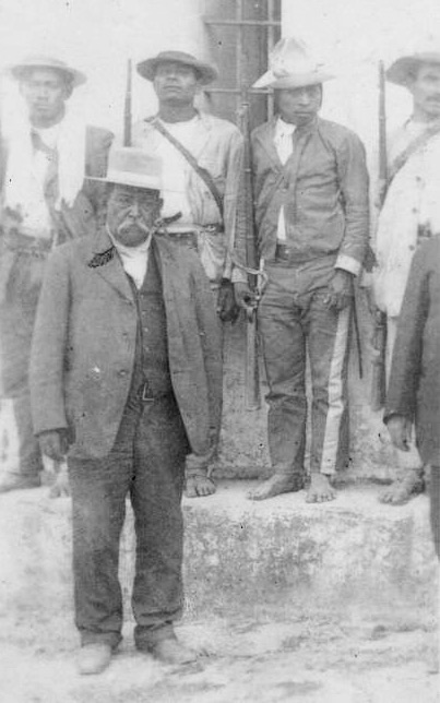 Semana trágica del 8 al 14 de abril de 1920 en Guatemala. Soldados que combatieron durante esas luchas.